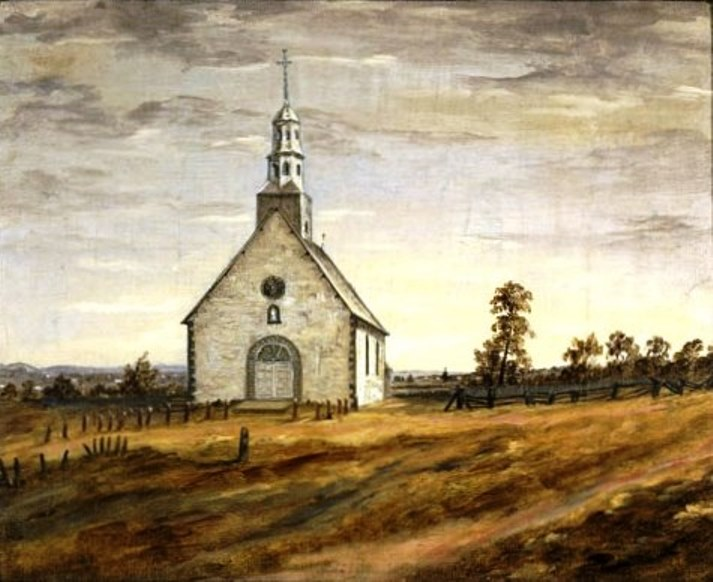 L'Église de Sainte-Foy, 1855 Joseph Légaré Musée de la civilisation, collection du Séminaire de Québec, 1991.34